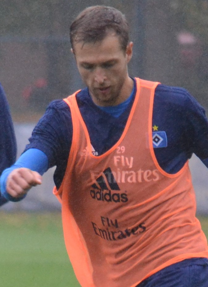 Matti Steinmann beim Training des Hamburger SV am 18. Oktober 2018.